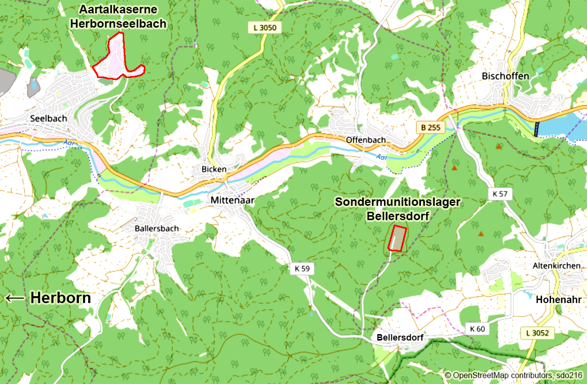 Lage des ehemaligen Sondermunitionslagers Bellersdorf und der Aartalkaserne in den Gemeinden Mittenaar und Herborn im Lahn-Dill-Kreis in Mittelhessen This map may be incomplete, and may contain errors. Don't rely solely on it for navigation.